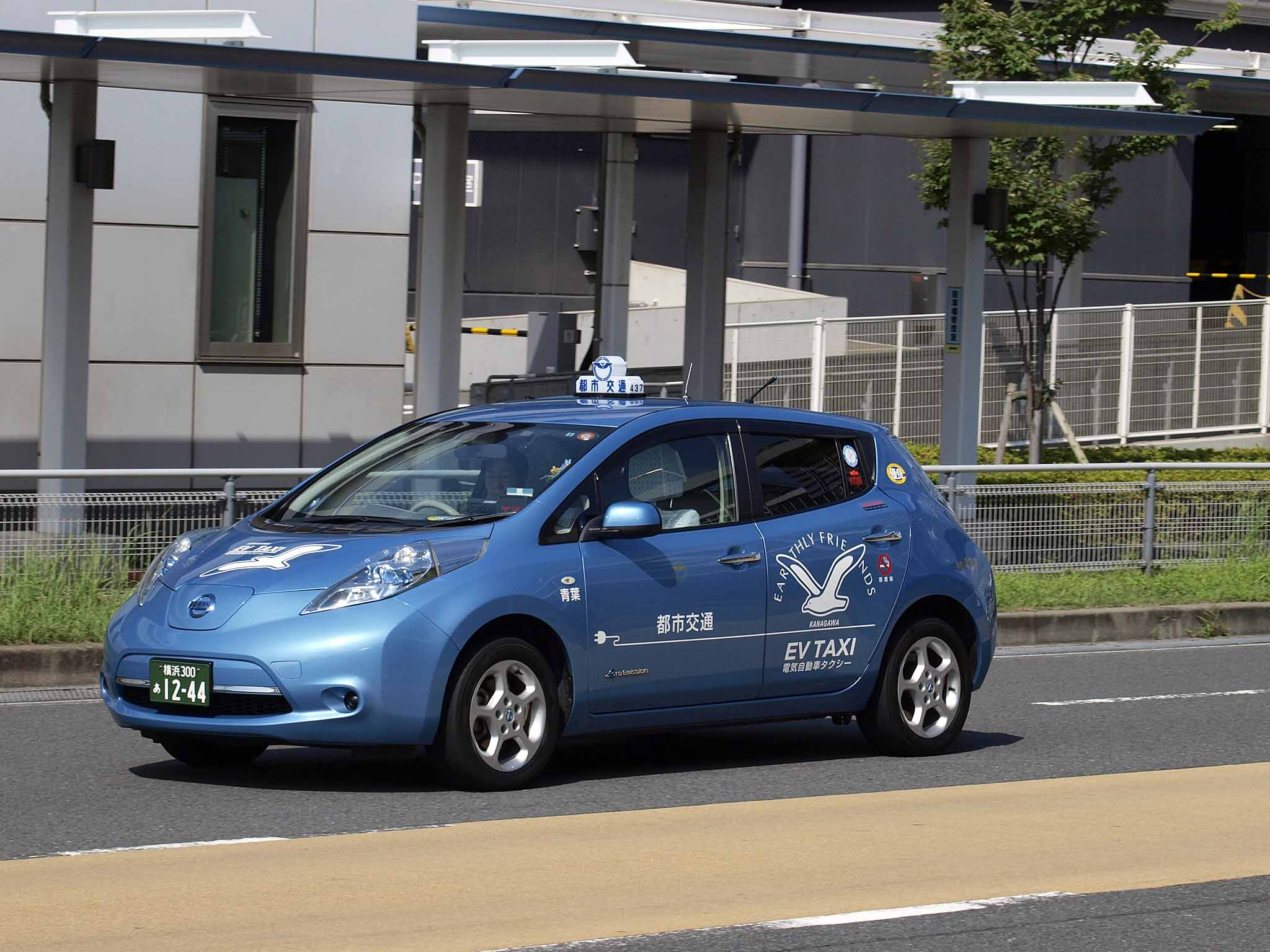 神奈川都市交通の日産リーフ。 登録番号：横浜300あ1244 撮影地：東京都大田区、東京国際空港国内線第二ターミナル